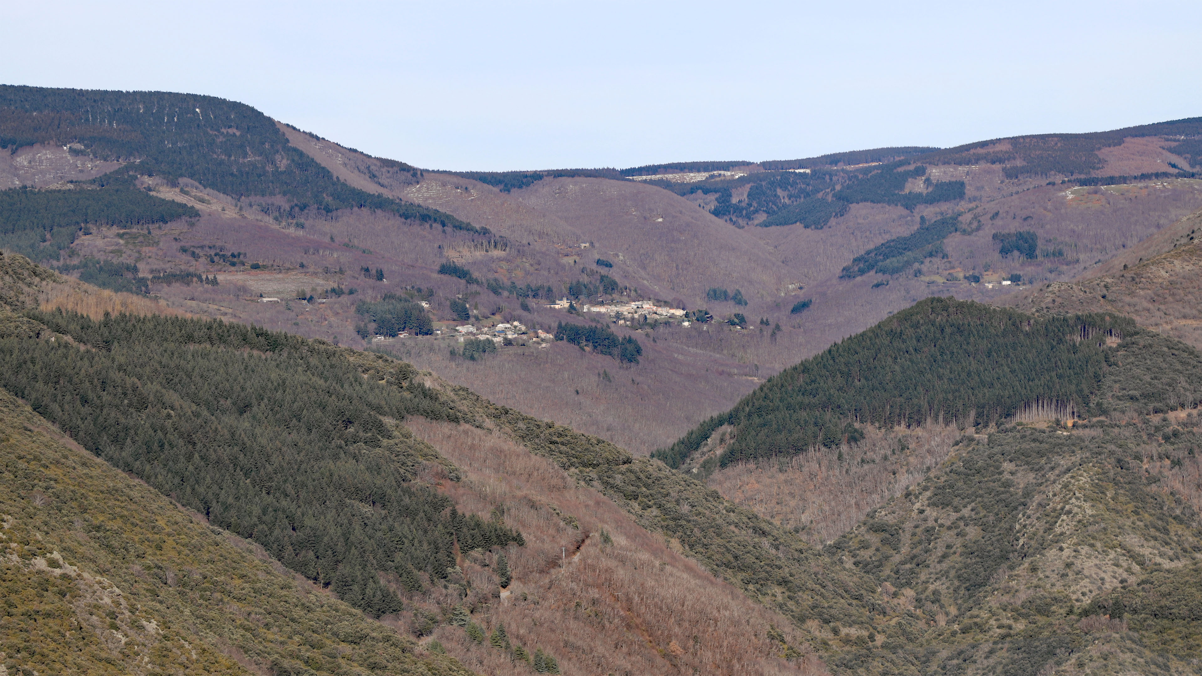 Vue lointaine